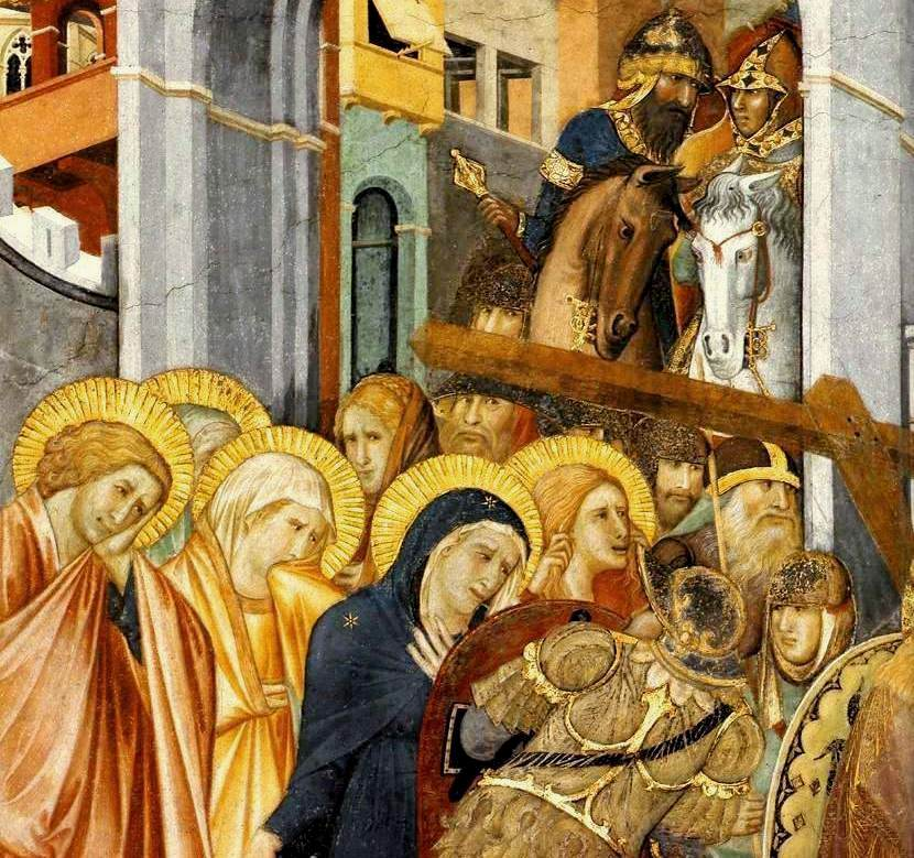 Assisi_frescoes_detail_pietro_lorenzetti